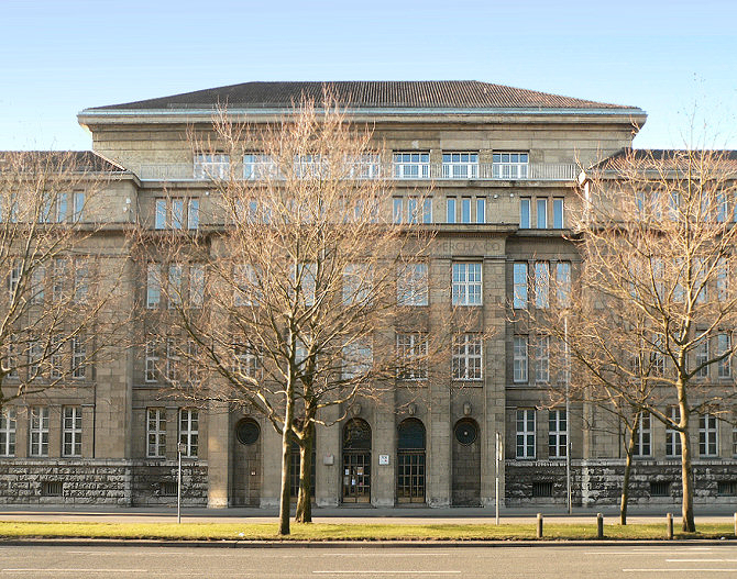 Früheres Verwaltungsgebäude der Continental AG an der Vahrenwalder Straße in Hannover.